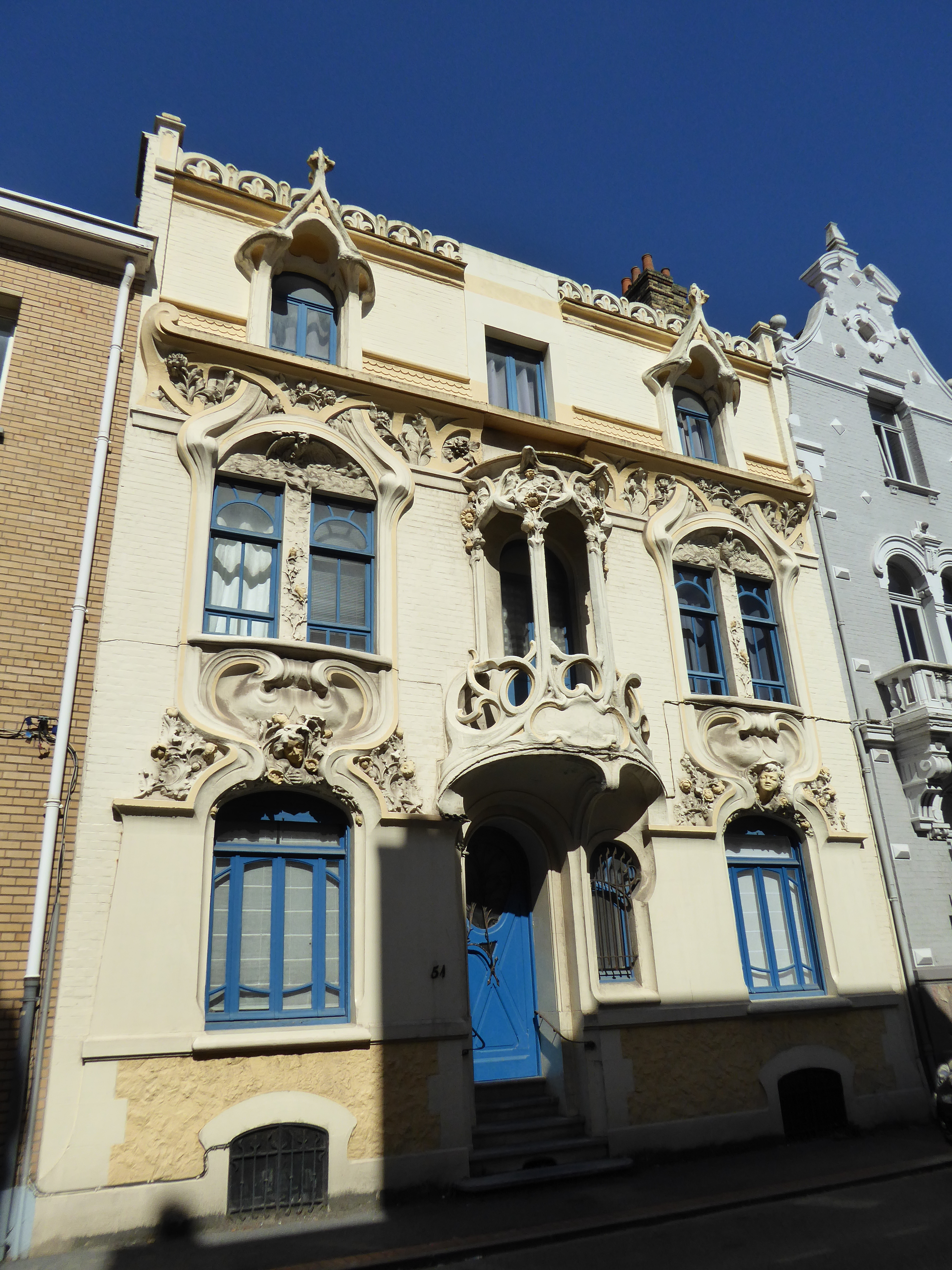 Cette maison a été construite entre 1903 et 1910 par l'entrepreneur C. Ringot. La façade en ciment simili-pierre est l'oeuvre du sculpteur Maurice Ringot ; l'ensemble ornemental dans un style Art Nouveau illustre les thèmes du Jour et de la Nuit autour de deux visages féminins, l'un éveillé et l'autre endormi, et un coq et une chouette. Le clocheton central a disparu pendant la Deuxième Guerre mondiale et le couronnement de l'oriel a été enlevé après 1970.